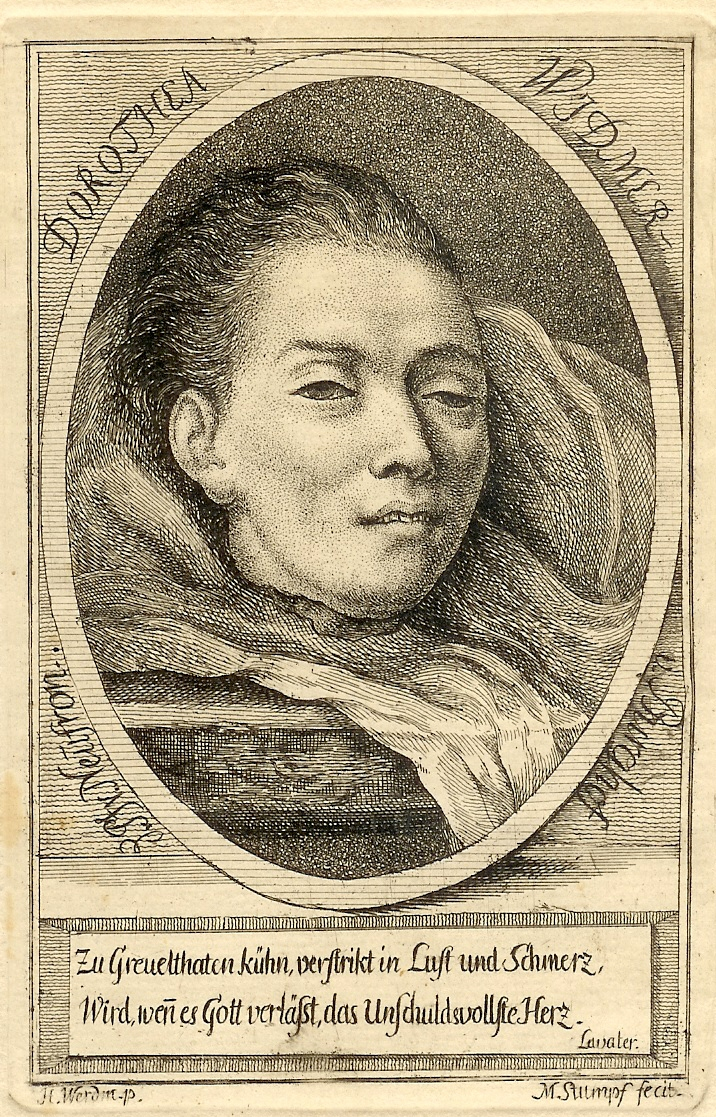 Das Haupt der am 29.08.1781 in Zürich hingerichteten Dorothea Widmer